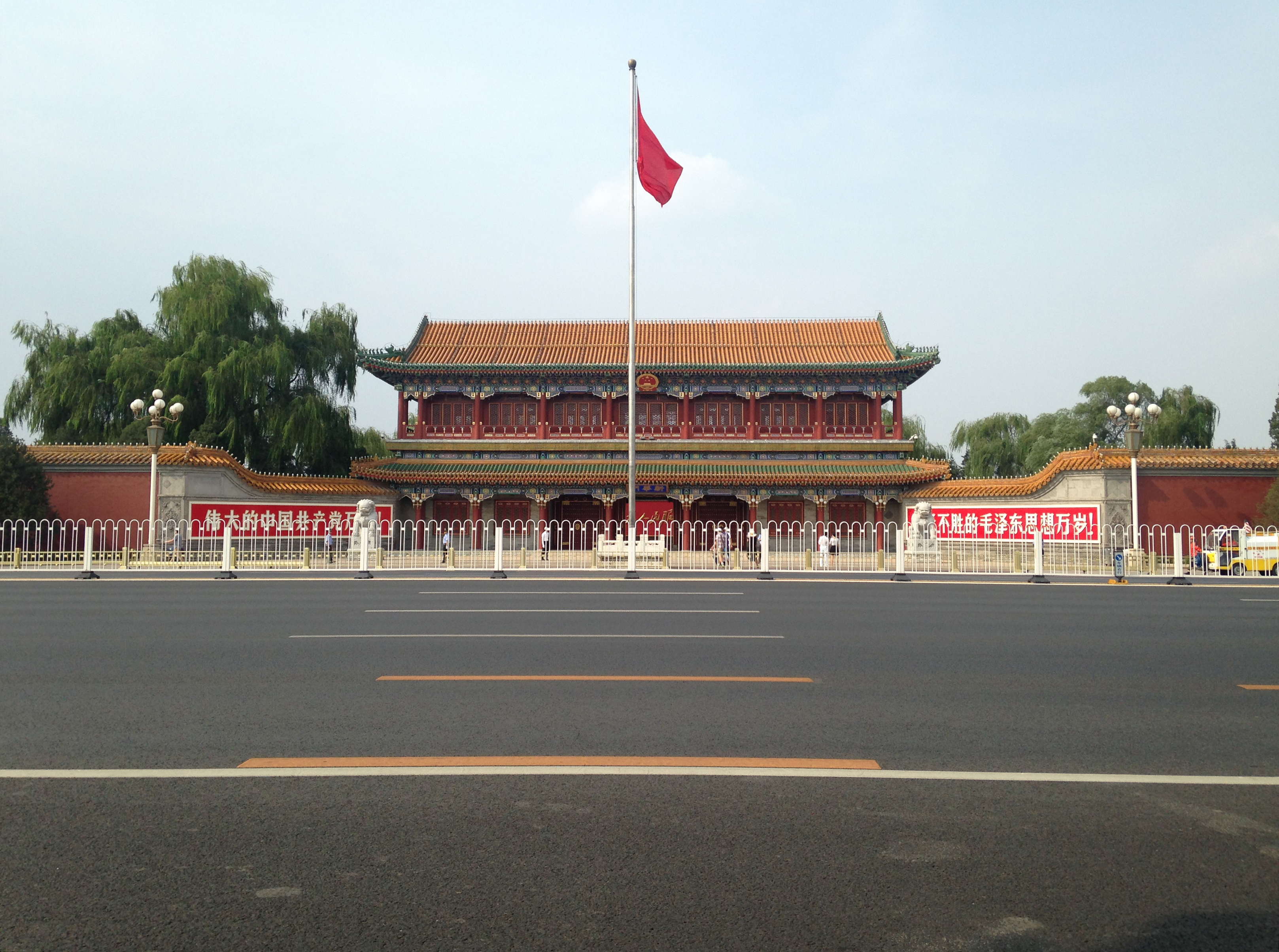 長安街の向こう側より望む新華門